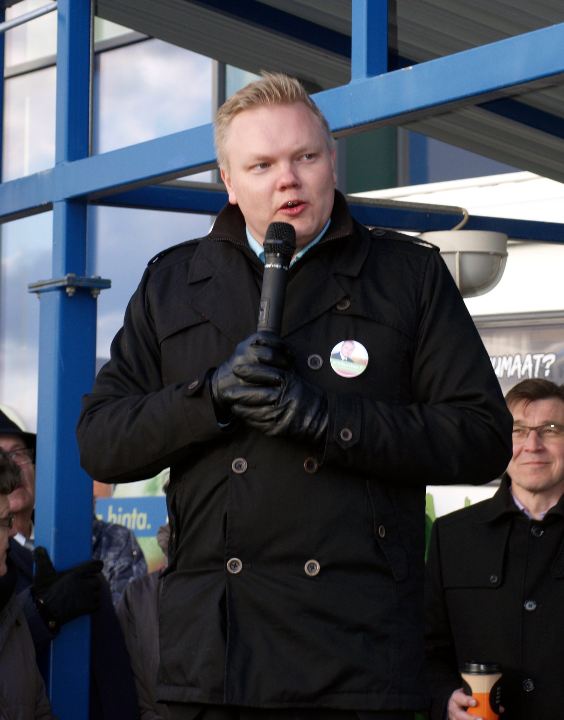 Antti Kurvinen maaliskuussa 2015.